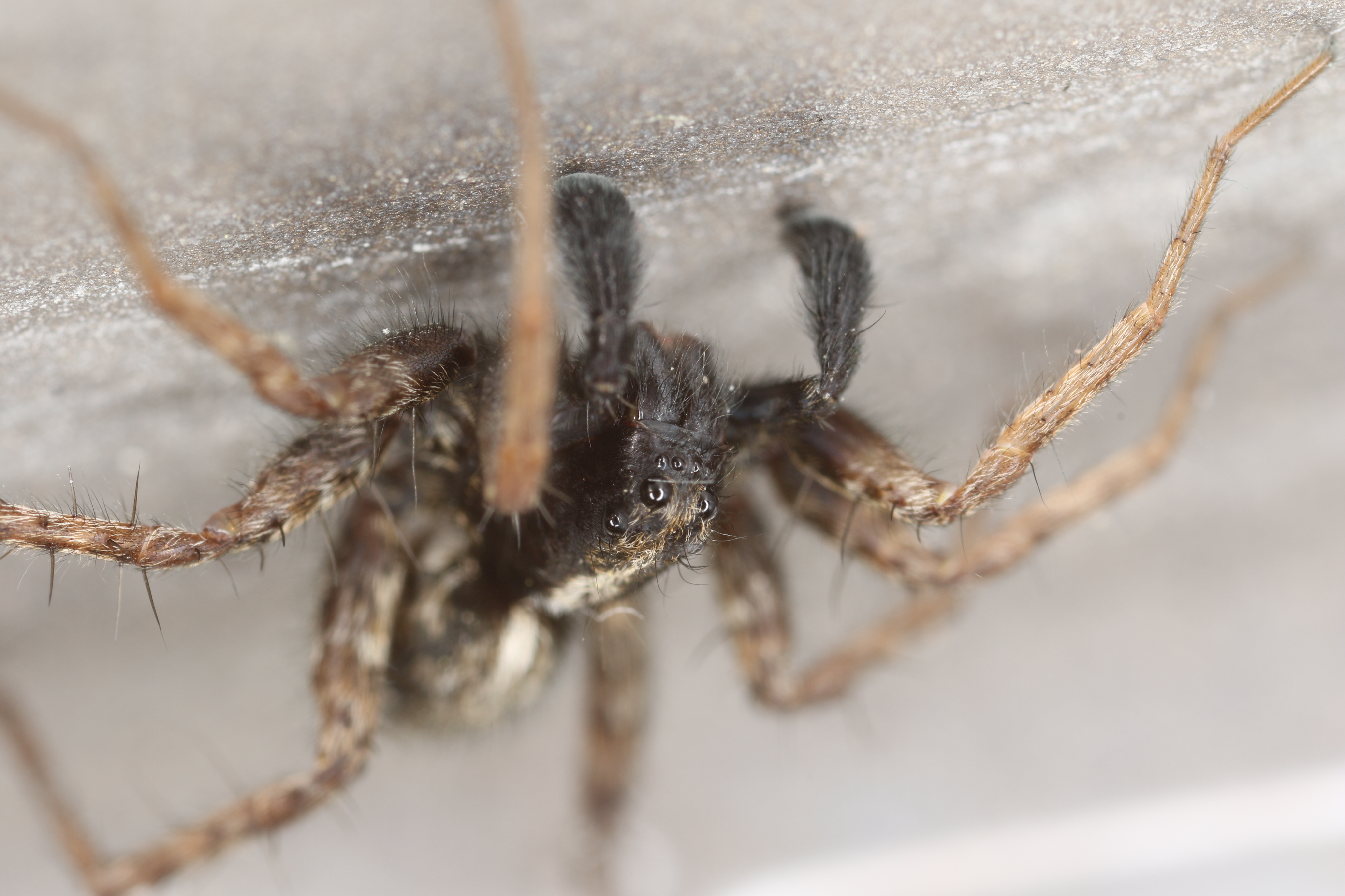 Pardosa amentata (Clerck, 1757), male, Utterslev Mose, Denmark, 7 May 2016